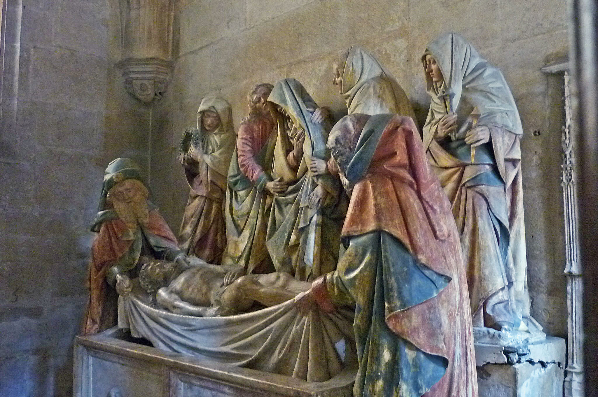 Grablegungsgruppe in der Kirche Notre-Dame in Semur-en-Auxois